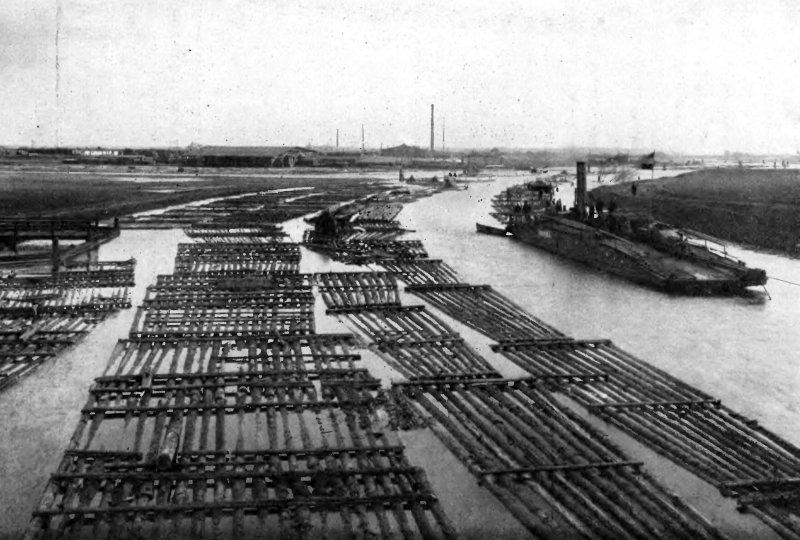 Spław drewna i żegluga holownicza Bydgoskiego Towarzystwa Żeglugi Holowniczej Spółka Akcyjna w Bydgoszczy - początek XX wieku